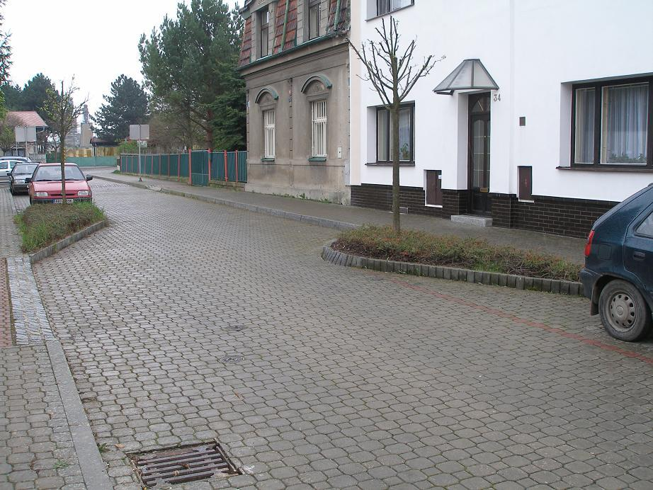 Praha-Satalice, Hálova 34/5, 55/3. Šikany na zklidněné komunikaci.